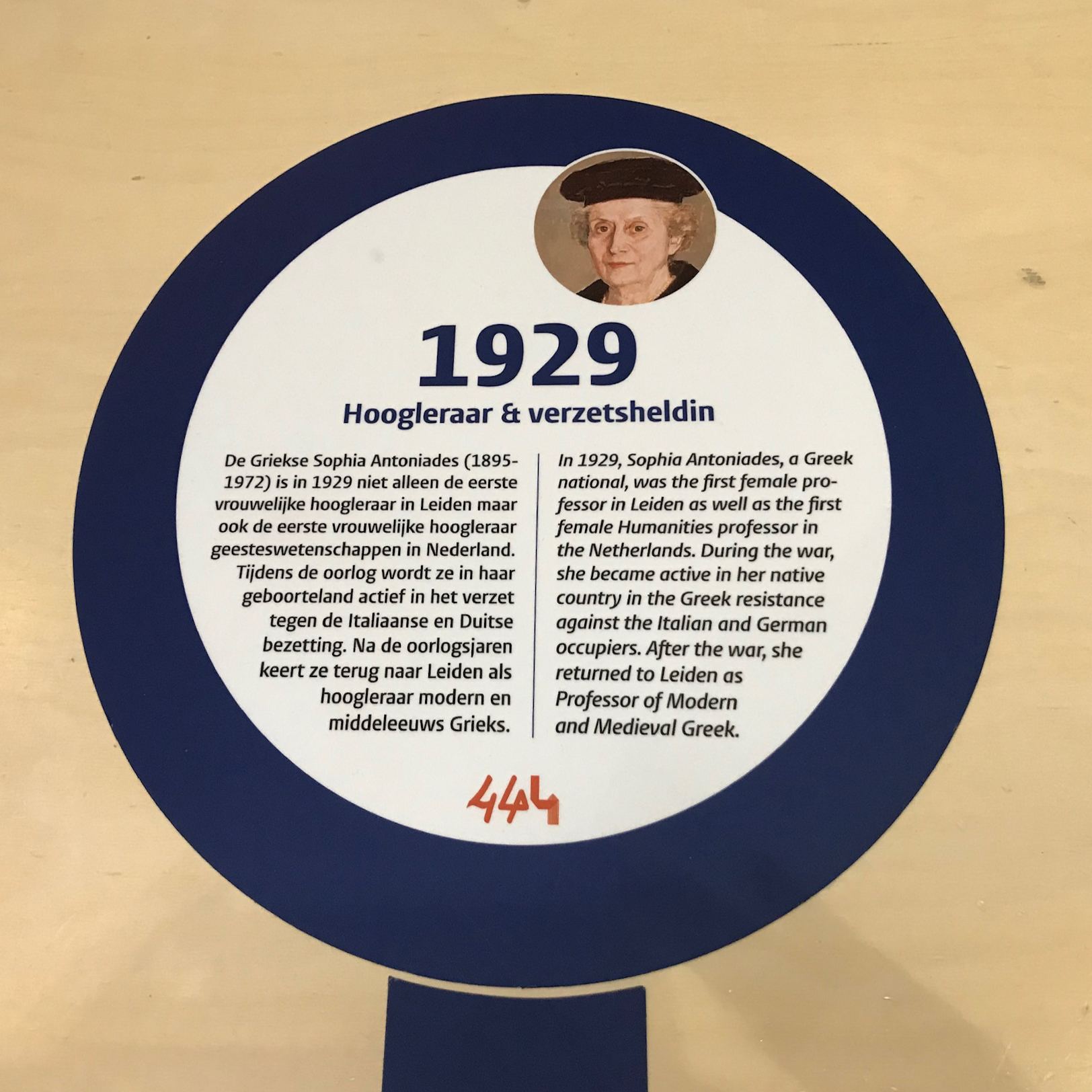 Sophia Antioniades in de tijdlijn van 444 jaar Geesteswetenschappen in het Lipsius-gebouw (Universiteit Leiden)